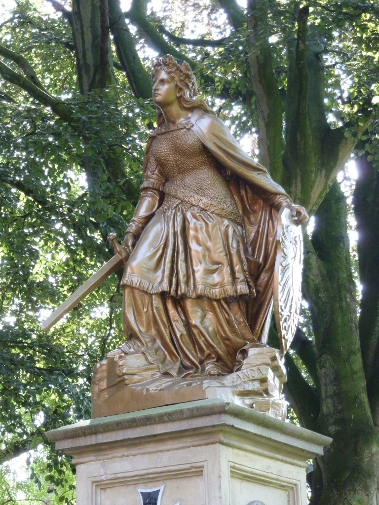 Germania-Denkmal auf dem Kirchplatz von Wittmund, Ostfriesland